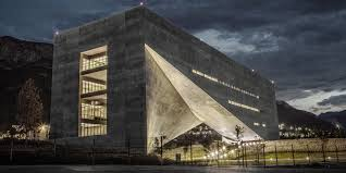 Fotografía panorámica del CRGS